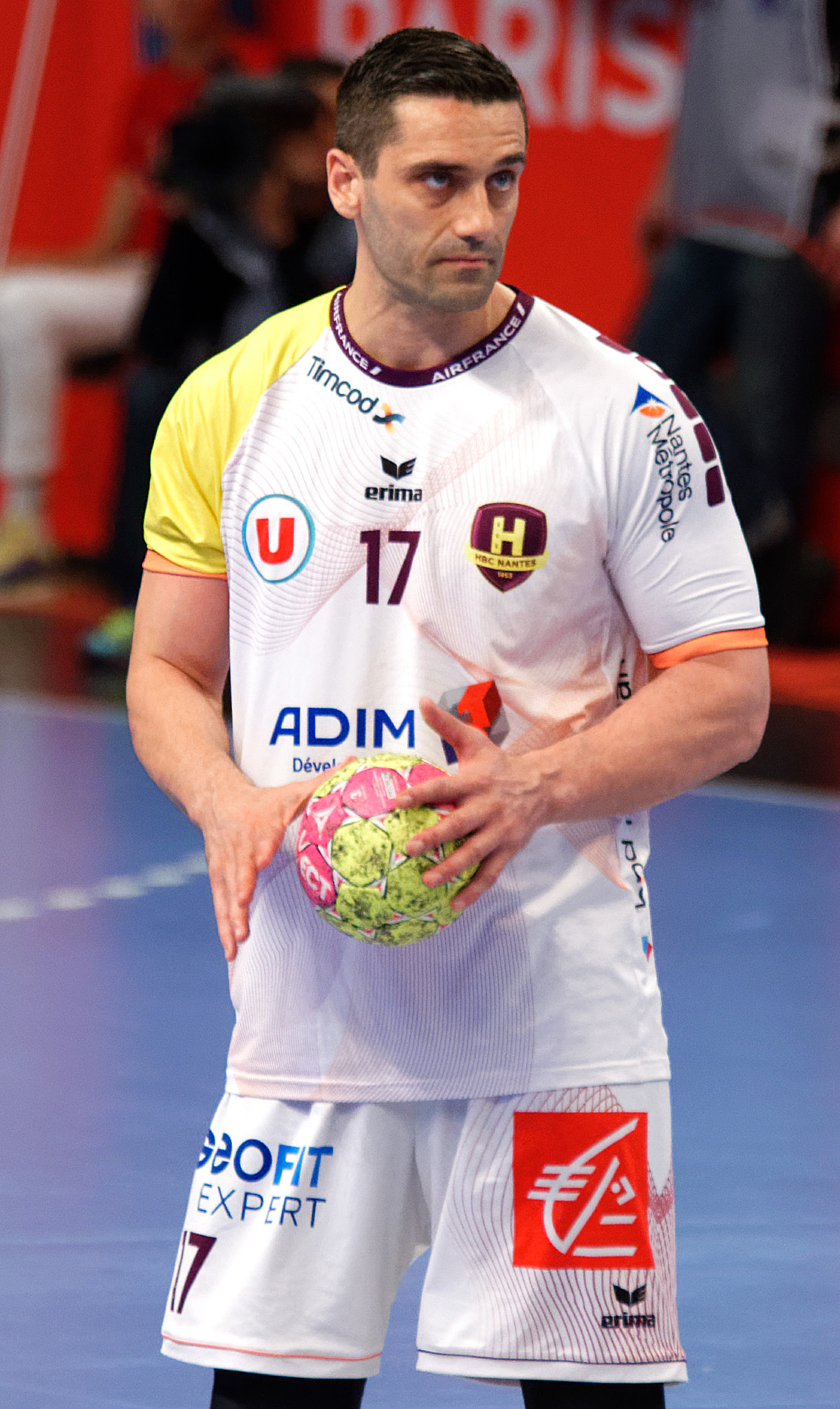 Rencontre de championnat entre le PSG et le HBC Nantes. A Coubertin, le 14 décembre 2018.